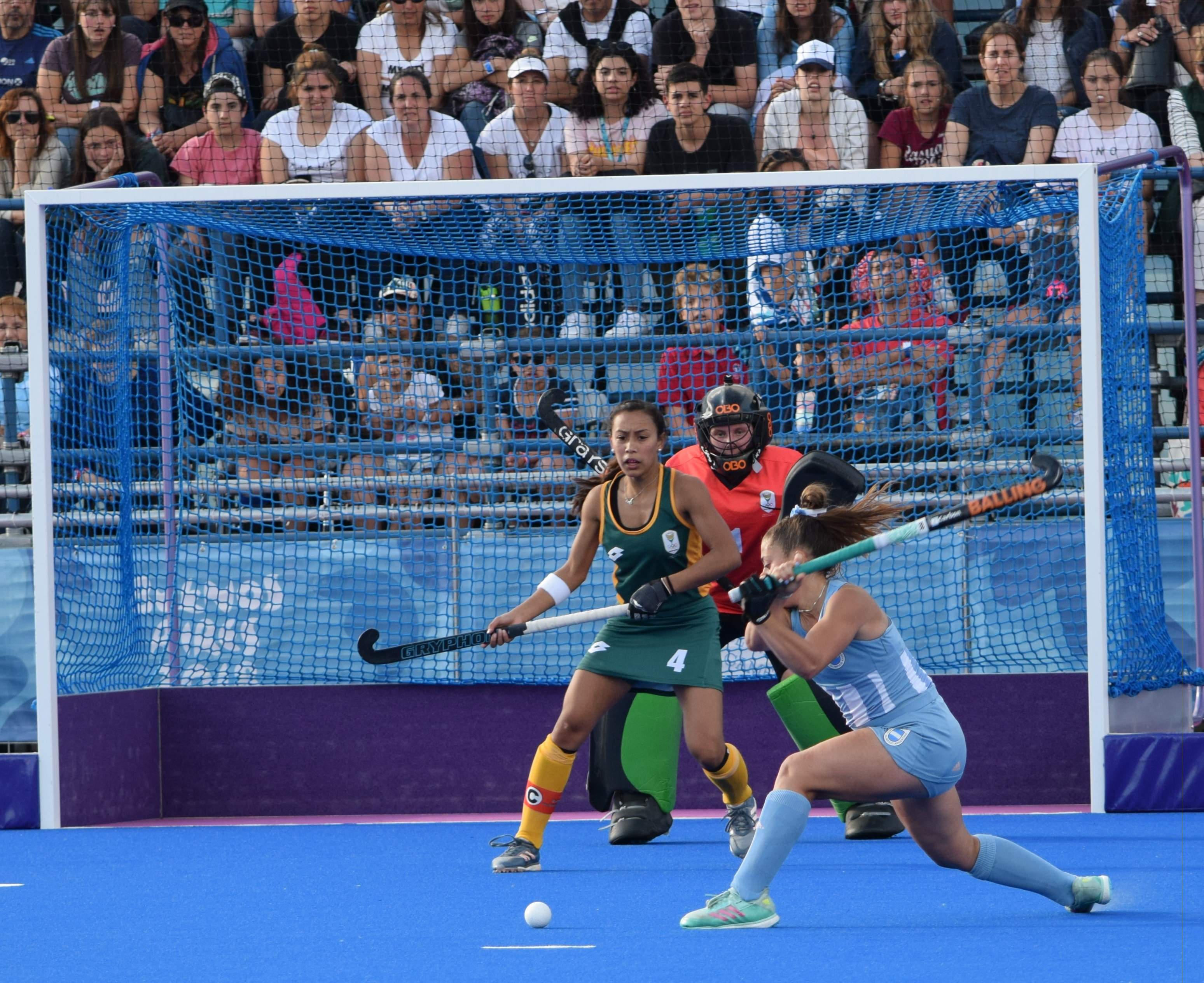 Semi-finales de Hockey5s, durante los Juegos Olímpicos de la Juventud 2018 en Buenos Aires. Tarde del 13 de octubre.